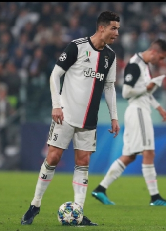 Cristiano Ronaldo con la maglia bianconera durante Juventus-Lokomotiv